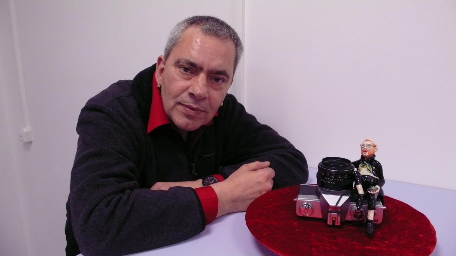 Porzellanfigur Fotograf von Jörg Marx